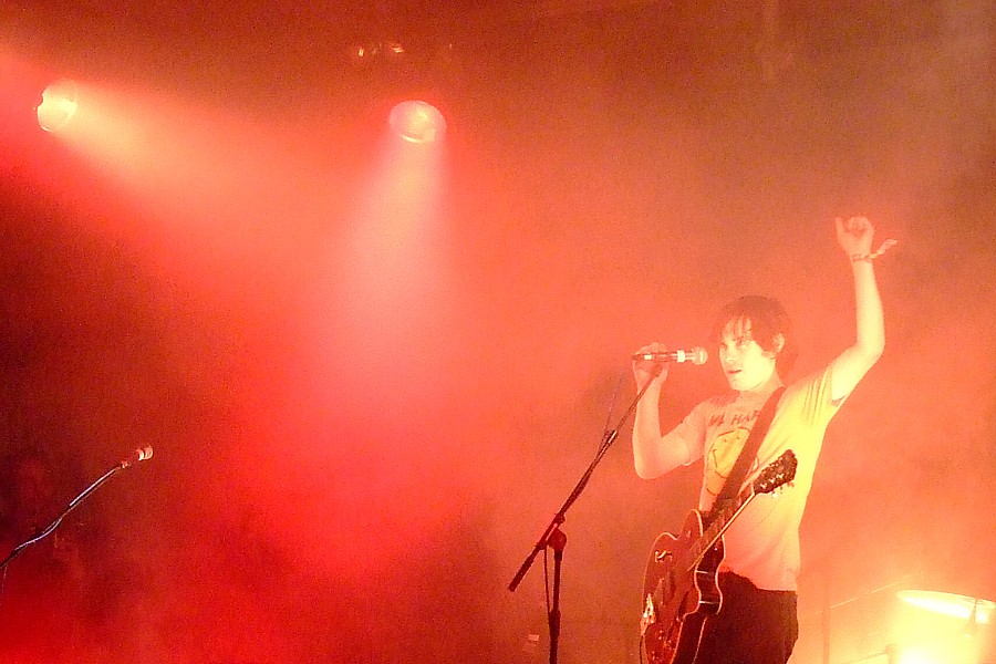 Goldrush